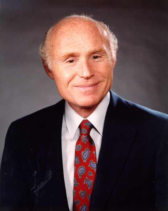 Herbert Kohl, U.S. Senator from Wisconsin.